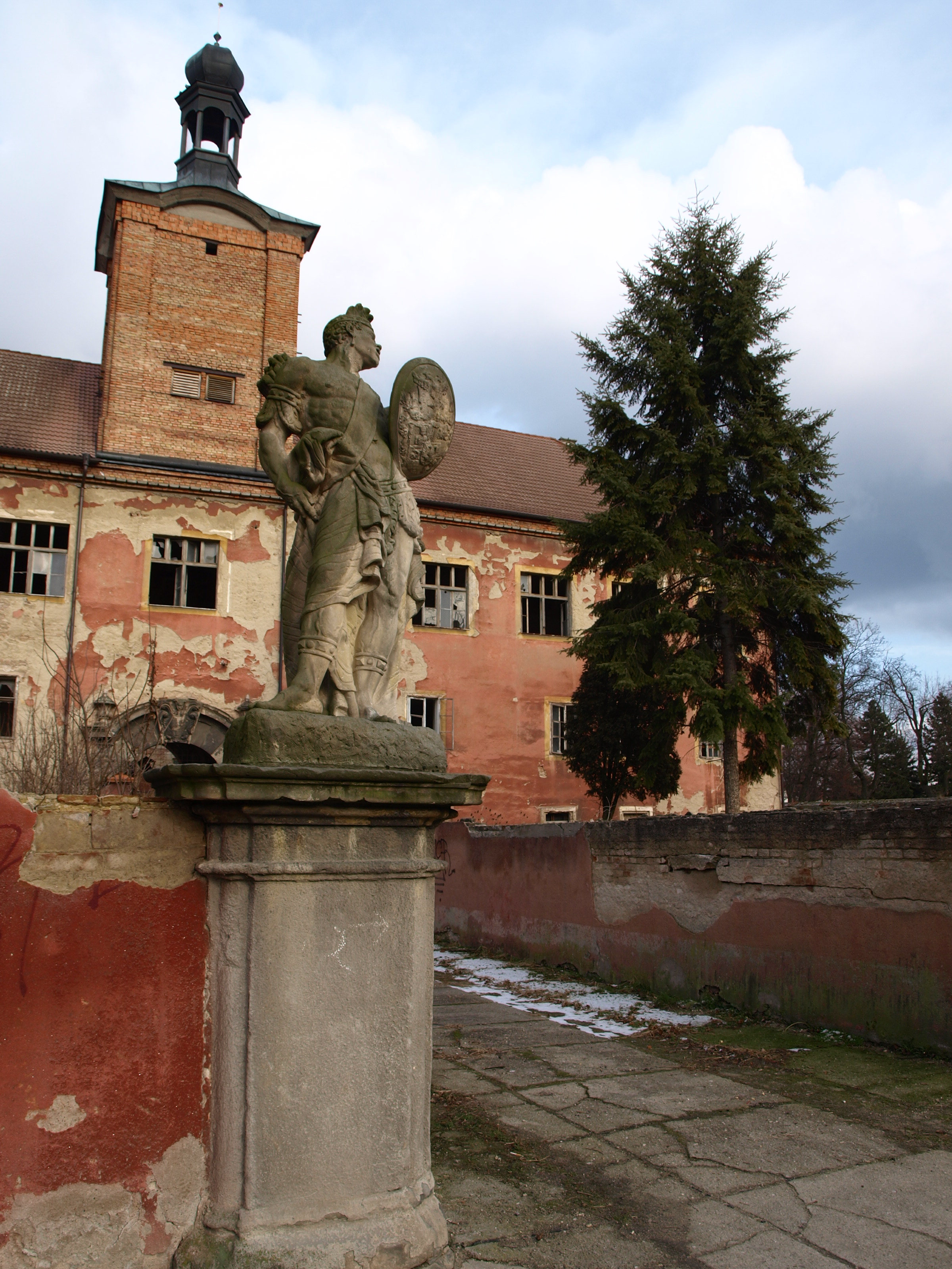 Ferdinand Maximilián Brokof - sochy Mouřenínů u vjezdu do zámku Kounice. Dnes osazeno kopiemi zhotovenými Aloisem Čihákem v 60. letech 20. stol.. Originály uloženy v lapidáriu Národní galerie.